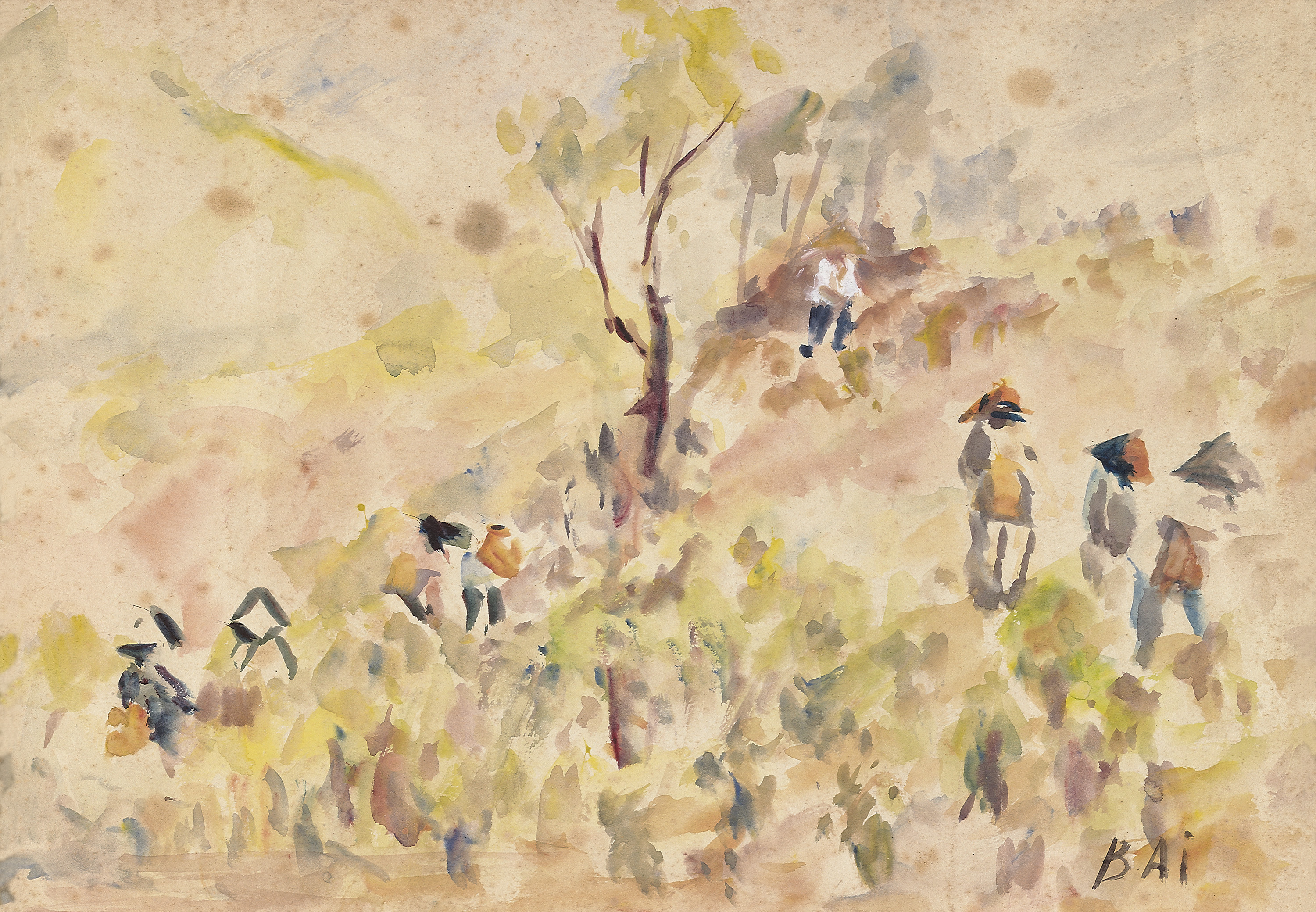 中文（台灣）: 李梅樹作品：茶園，創作時間不詳，水彩。 以水彩速寫方式，進行戶外寫生，記錄茶園景色。